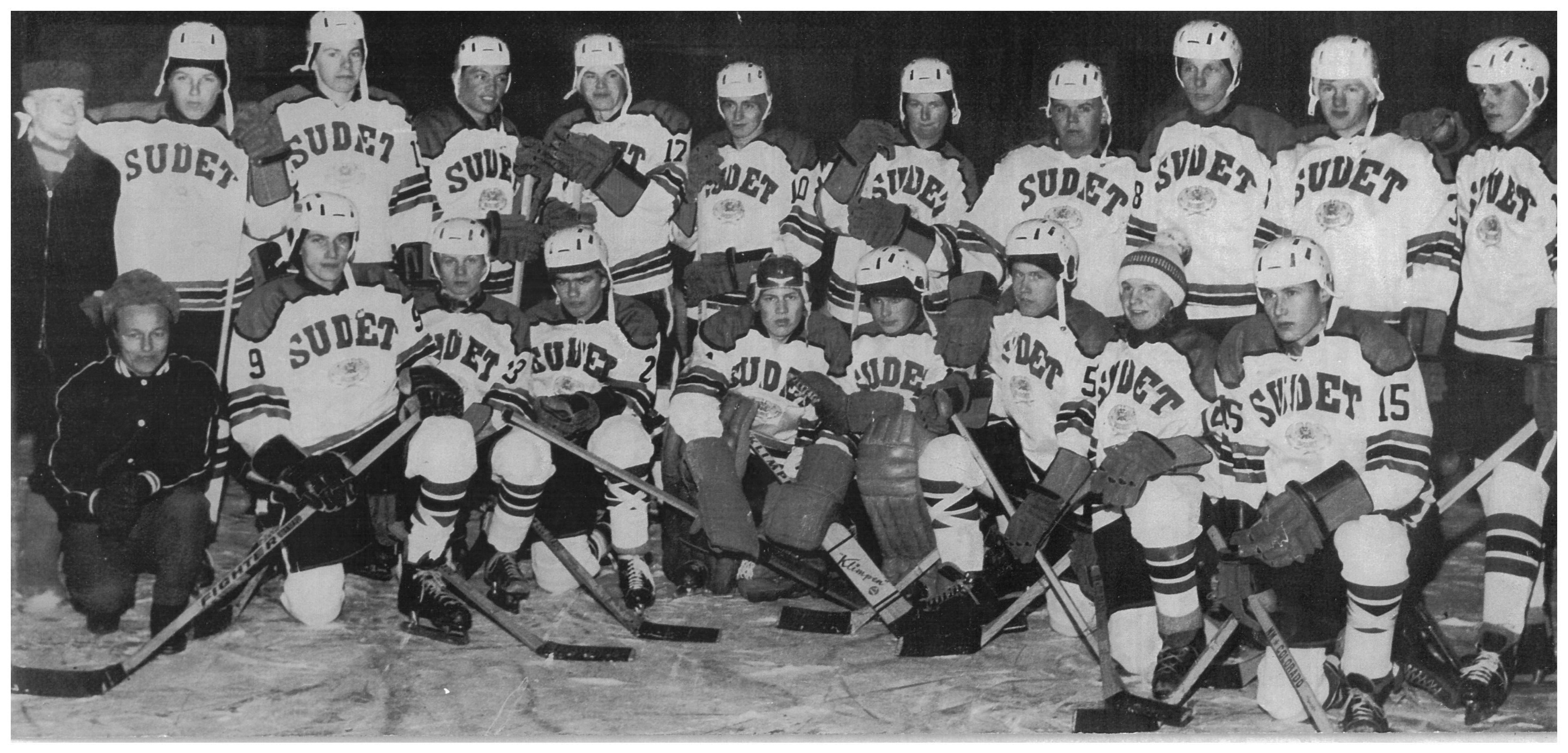 Kouvolan Susien jääkiekkojoukkue. Ennen Kouvolan Pallonlyöjien kanssa fuusioitumista Kouvolan Kiekko-65 (KooKooksi).